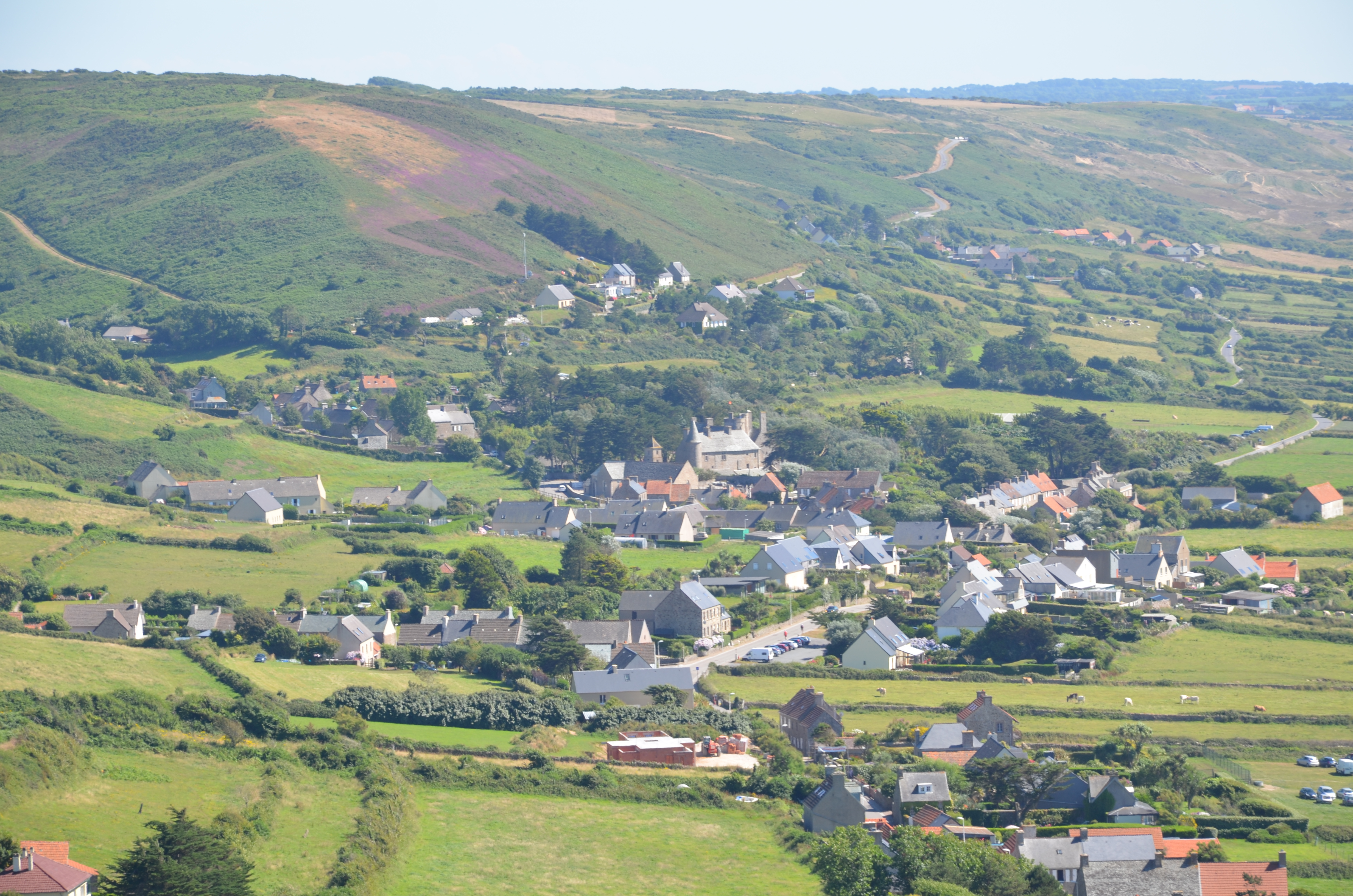 Vue sur le bourg de Vauville depuis les Pierres pouquelées.